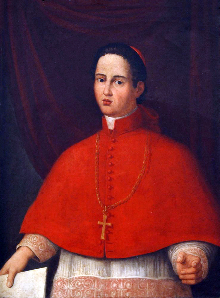 Su uno sfondo grigio, con tenda cremisi, è raffigurato il vescovo in piedi, cotta bianca, cappa rossa e croce dorata al collo; con la mano destra esibisce una lettera e con la sinistra accenna all'osservatore. Ha aspetto giovanile, con corti capelli scuri.